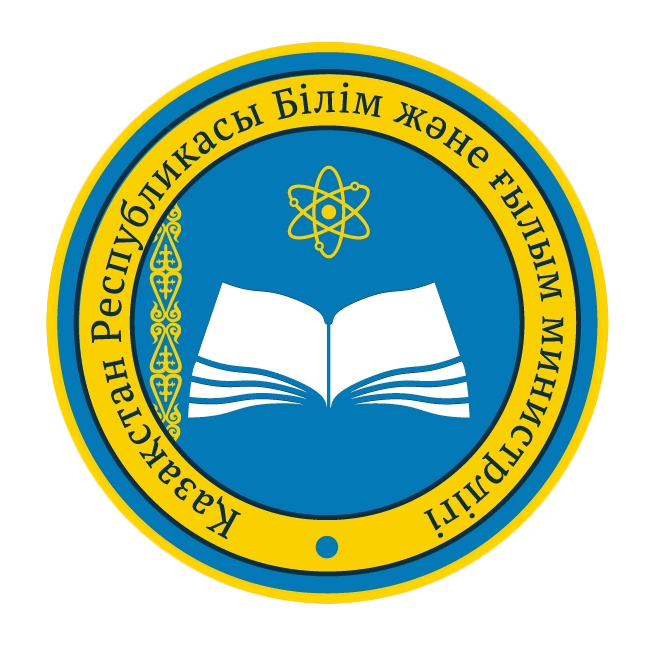 Эмблема министерства образования и науки Республики Казахстан